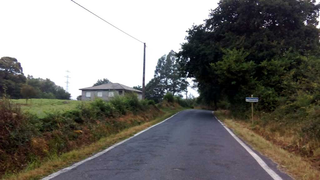 Vista da Penarrubia, Curtis.